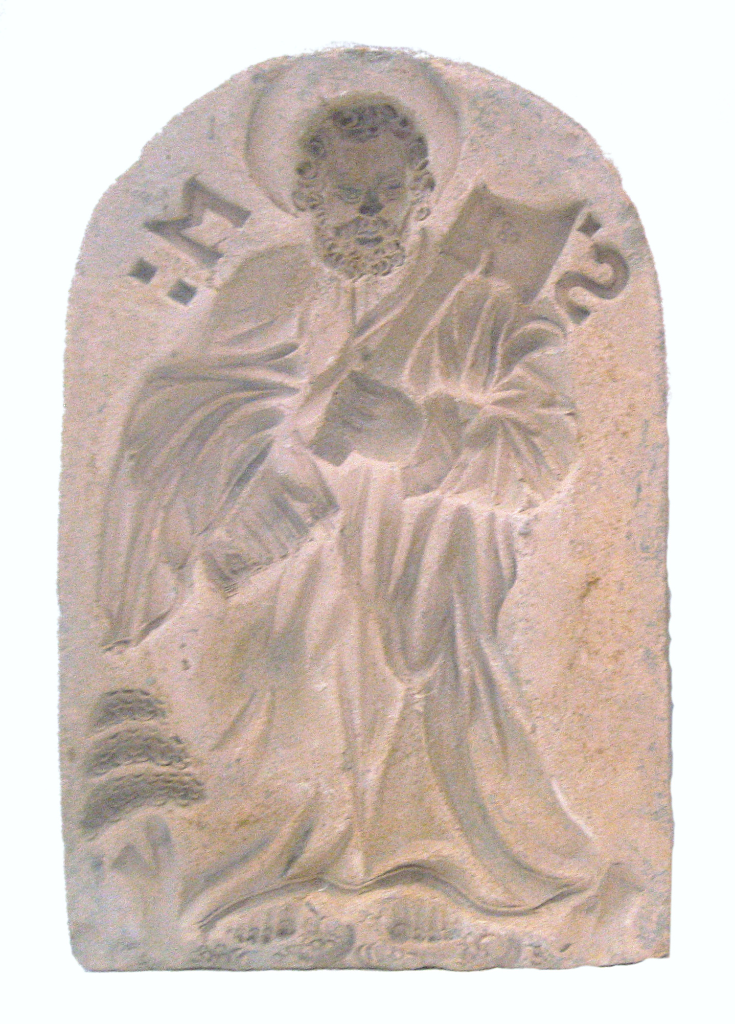 Matrize für den Apostel Matthias aus St. Georgen / Rottal / Niederbayern